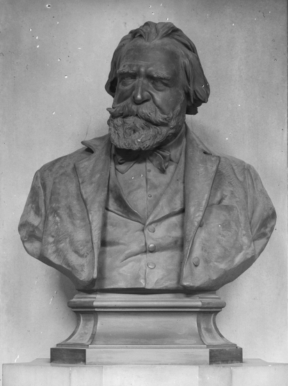 Büste Theodor Meynert (1833–1892) in der Universität Wien von Theodor Khuen